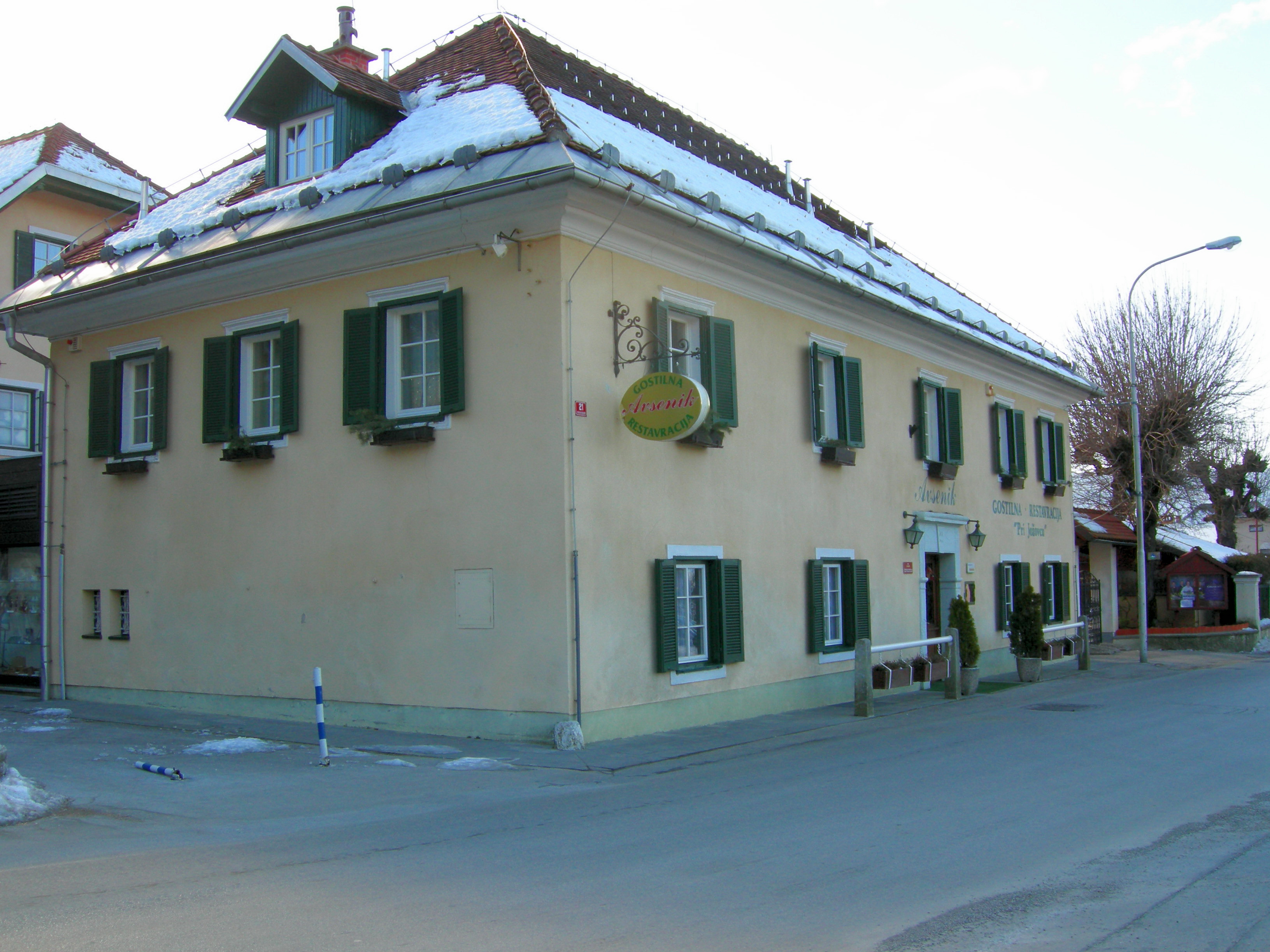 Restaurant Pri Jožovcu, run by the Avsenik brothers, village Begunje na Gorenjskem, Slovenia